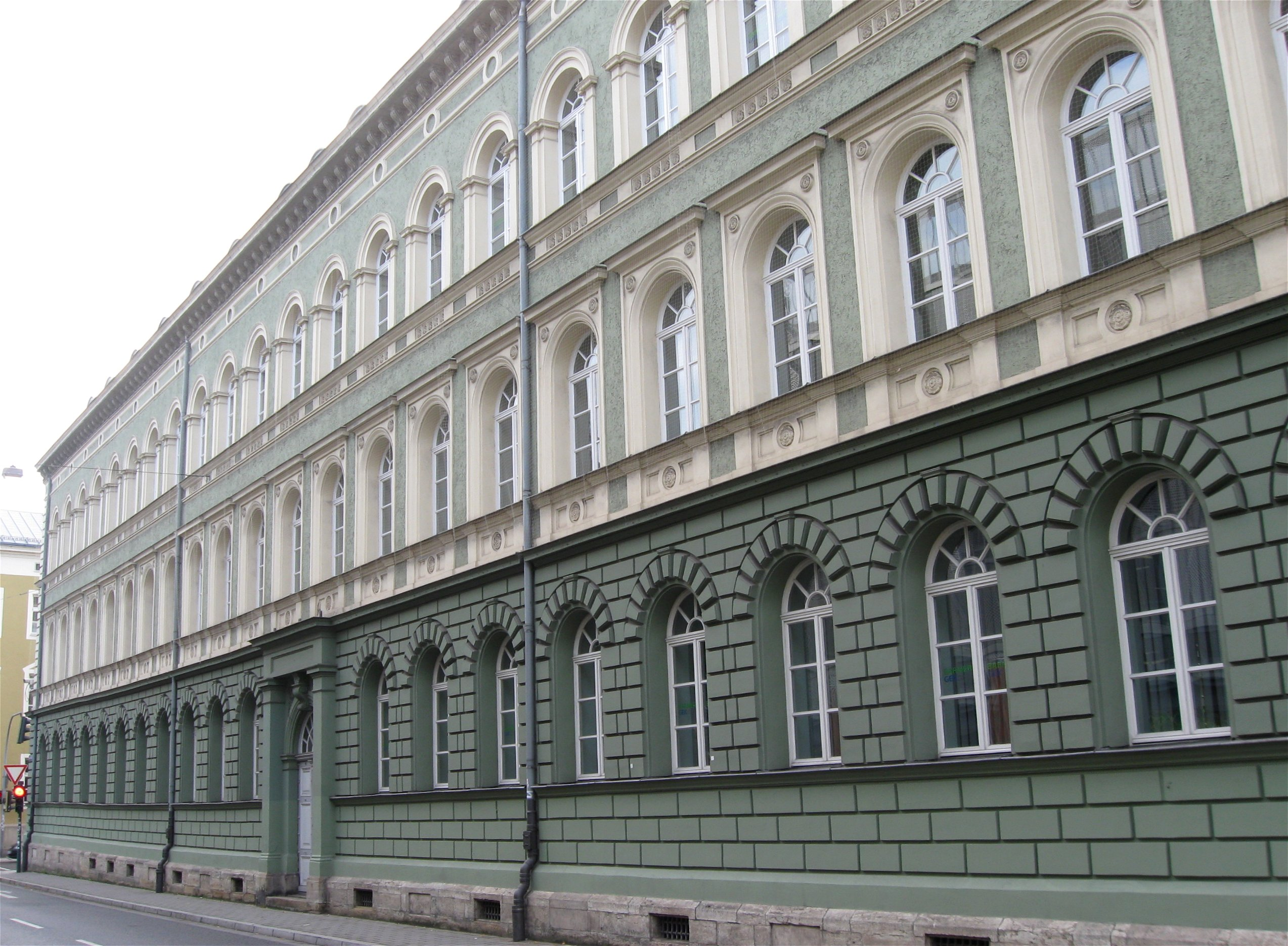 D.-Martin-Luther-Straße 8; Ehem. Klarenangerschule, dreigeschossige Zweiflügelanlage mit Walmdach in Ecklage, Werkstein- und Putzgliederungen in Formen der Neurenaissance, 1869 von Eduard Pahl und Joseph Negele, 1983 zu Büro- und Verwaltungsgebäude umgebaut; südlich des Gebäudes Reste der römischen Legionslagermauer, um 179 n. Chr.